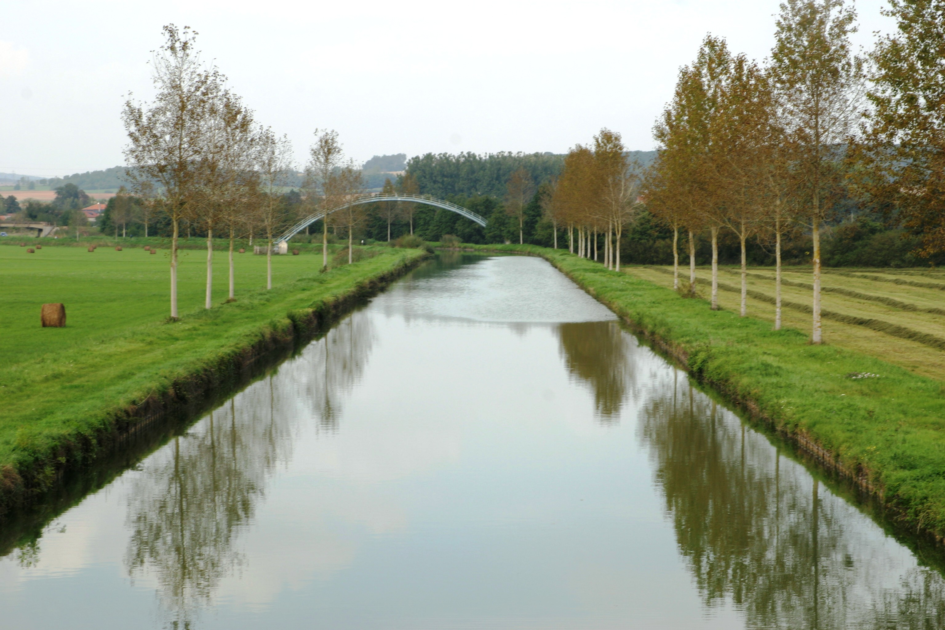 Le Canal de l'est (branche nord) au sud de Mouzay